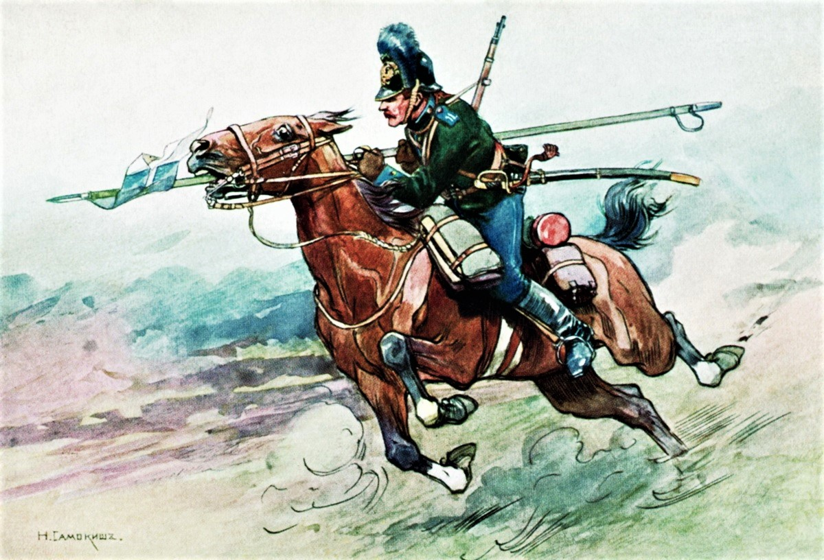 Николай Самокиш. Рядовой 11-го драгунского Рижского полка. Почтовая карточка